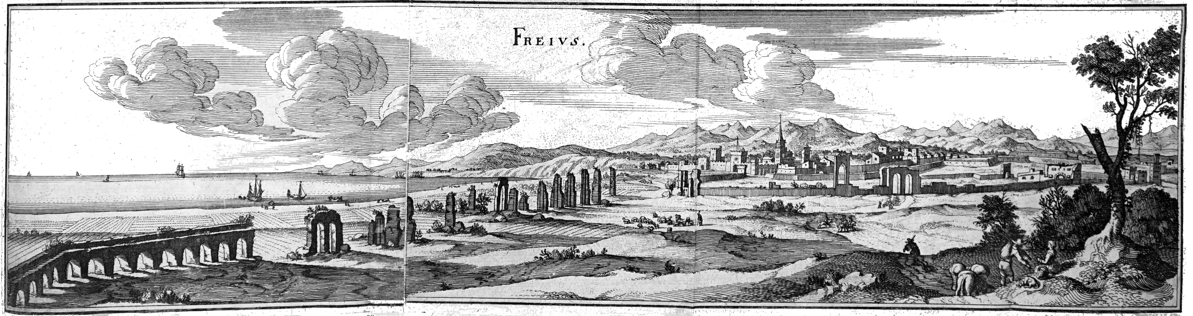 extrait du "topographia galliae".